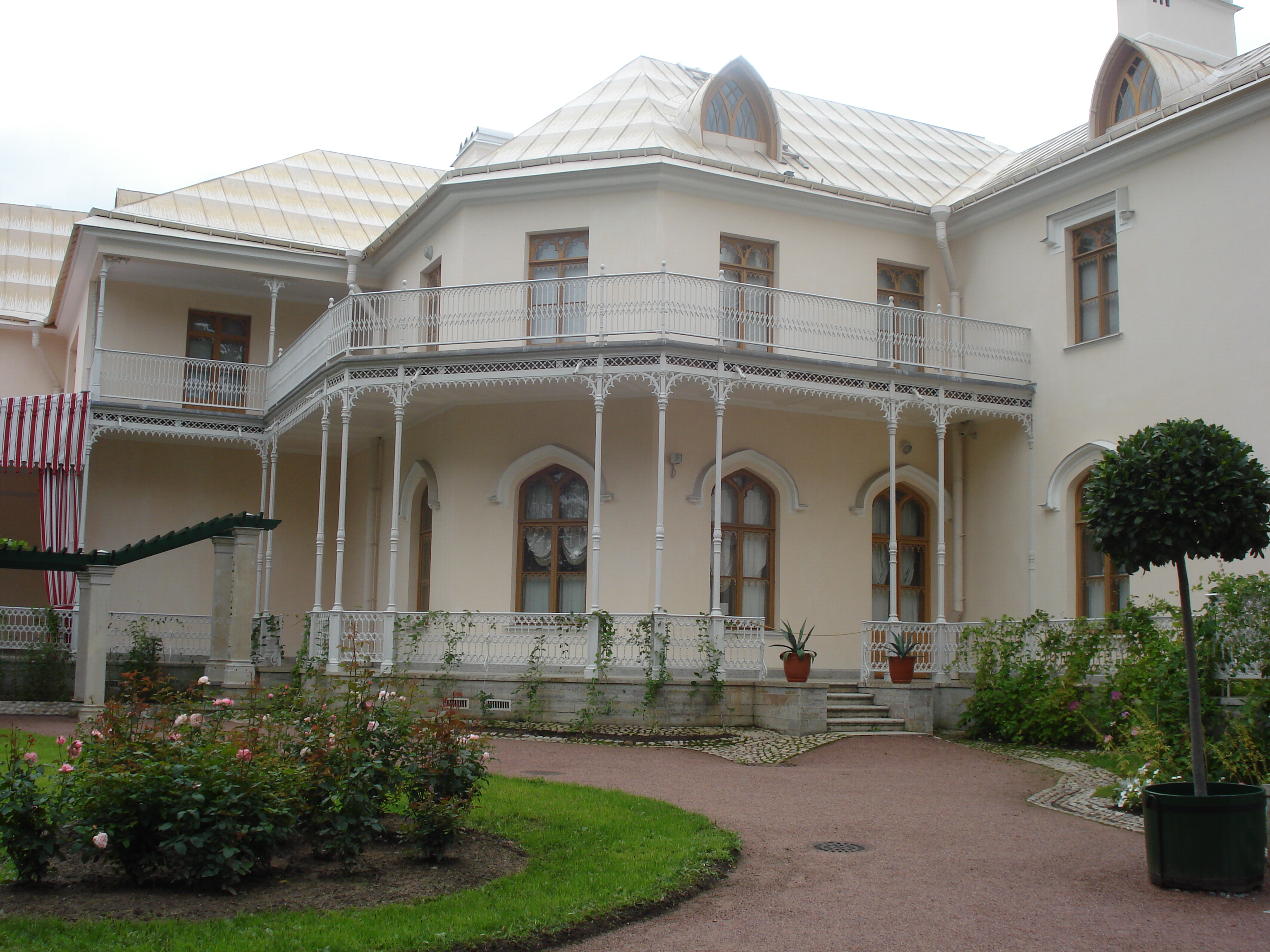 парк Александрия, дворец Фермерский